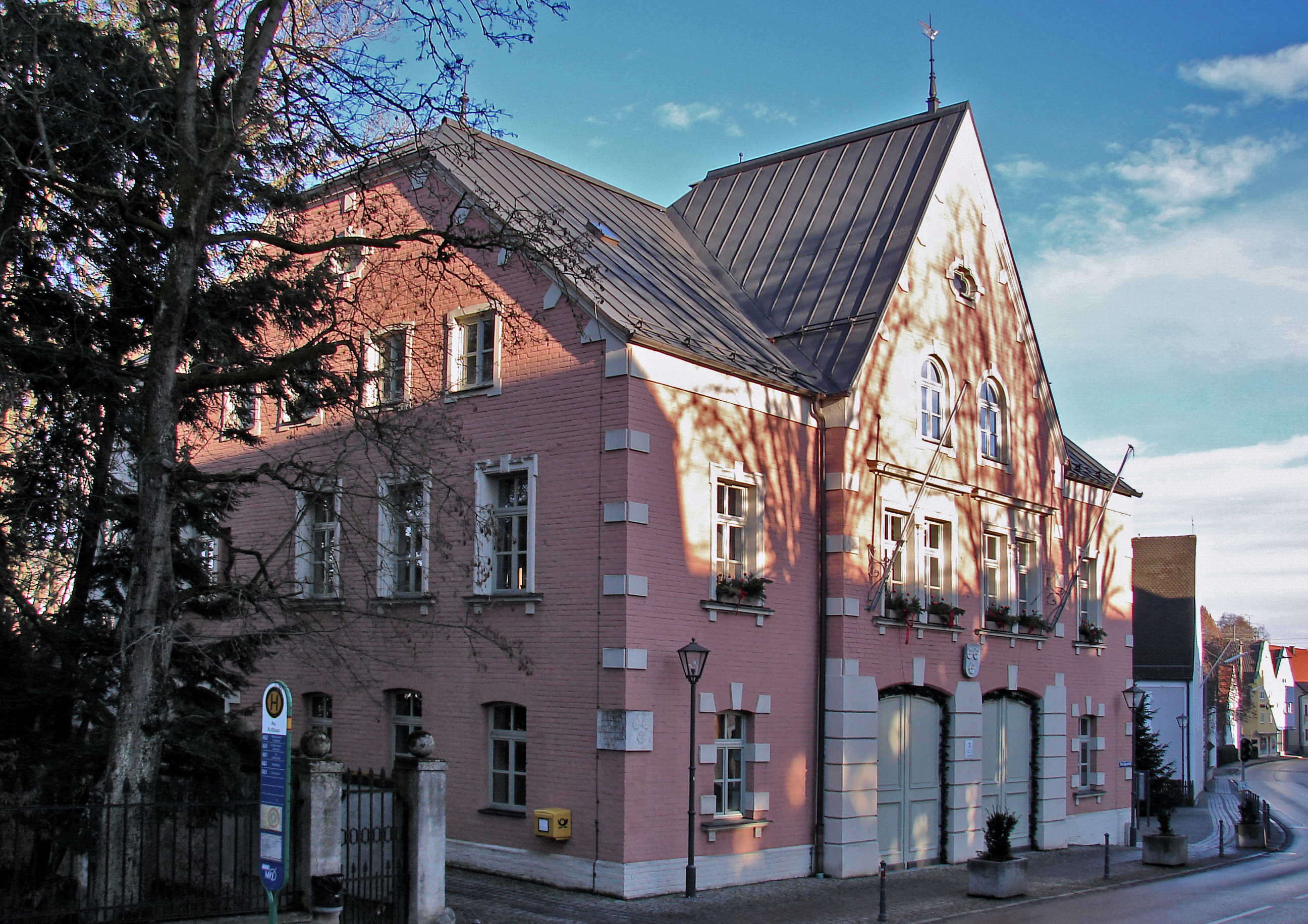 Rathaus in Au/Hallertau (Landkreis Freising, Bayern, Deutschland)